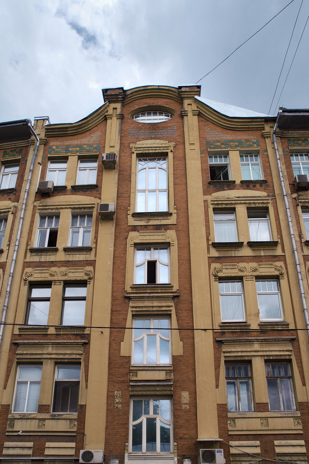 Trubnikovsky Lane, Moscow